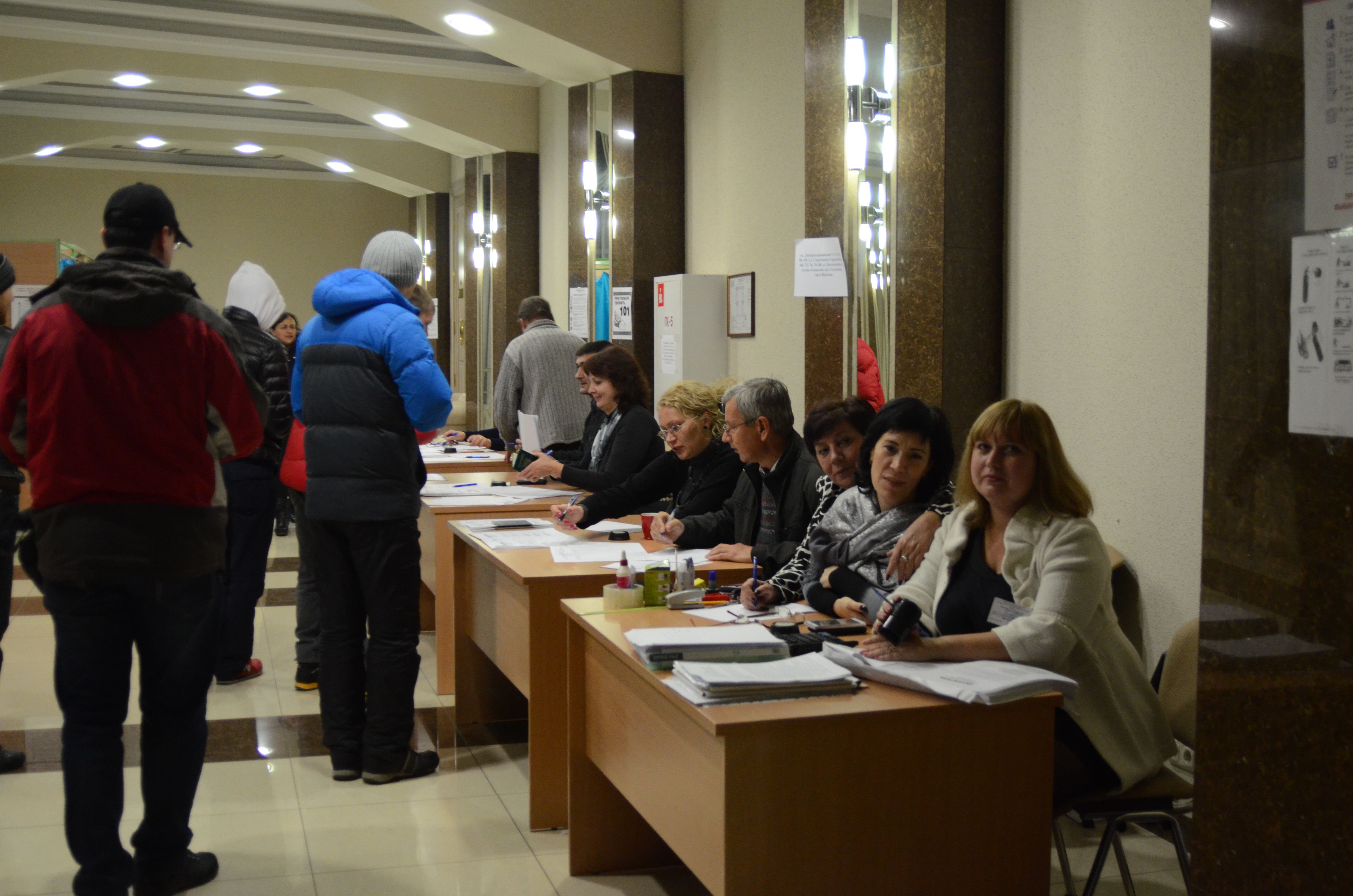 Выборы в Донецке